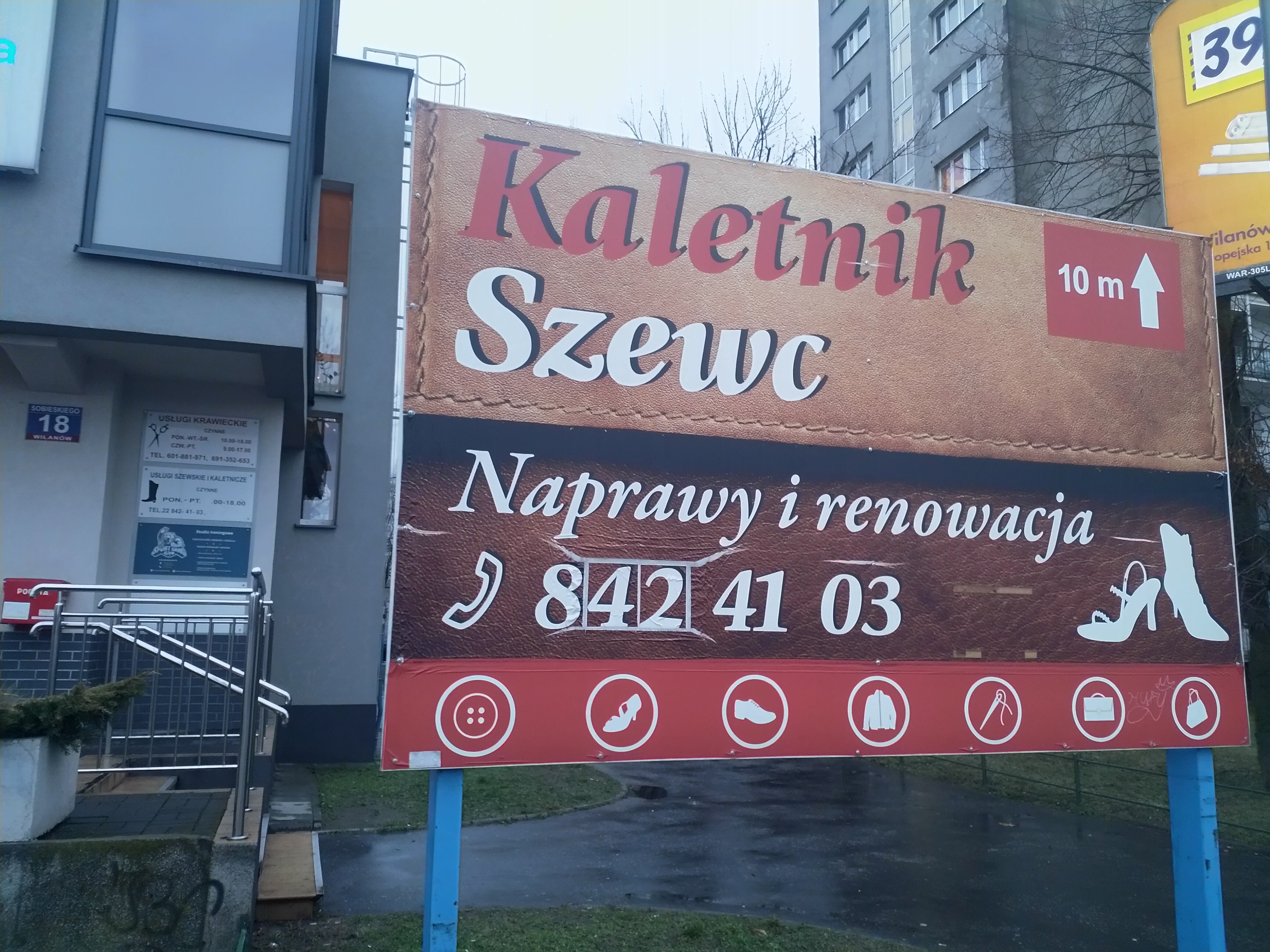 Szyld Kaletnika na ul. Sobieskiego 18 w Warszawie, zakładu niegdyś prowadzonego przez Józefa Walaszczyka